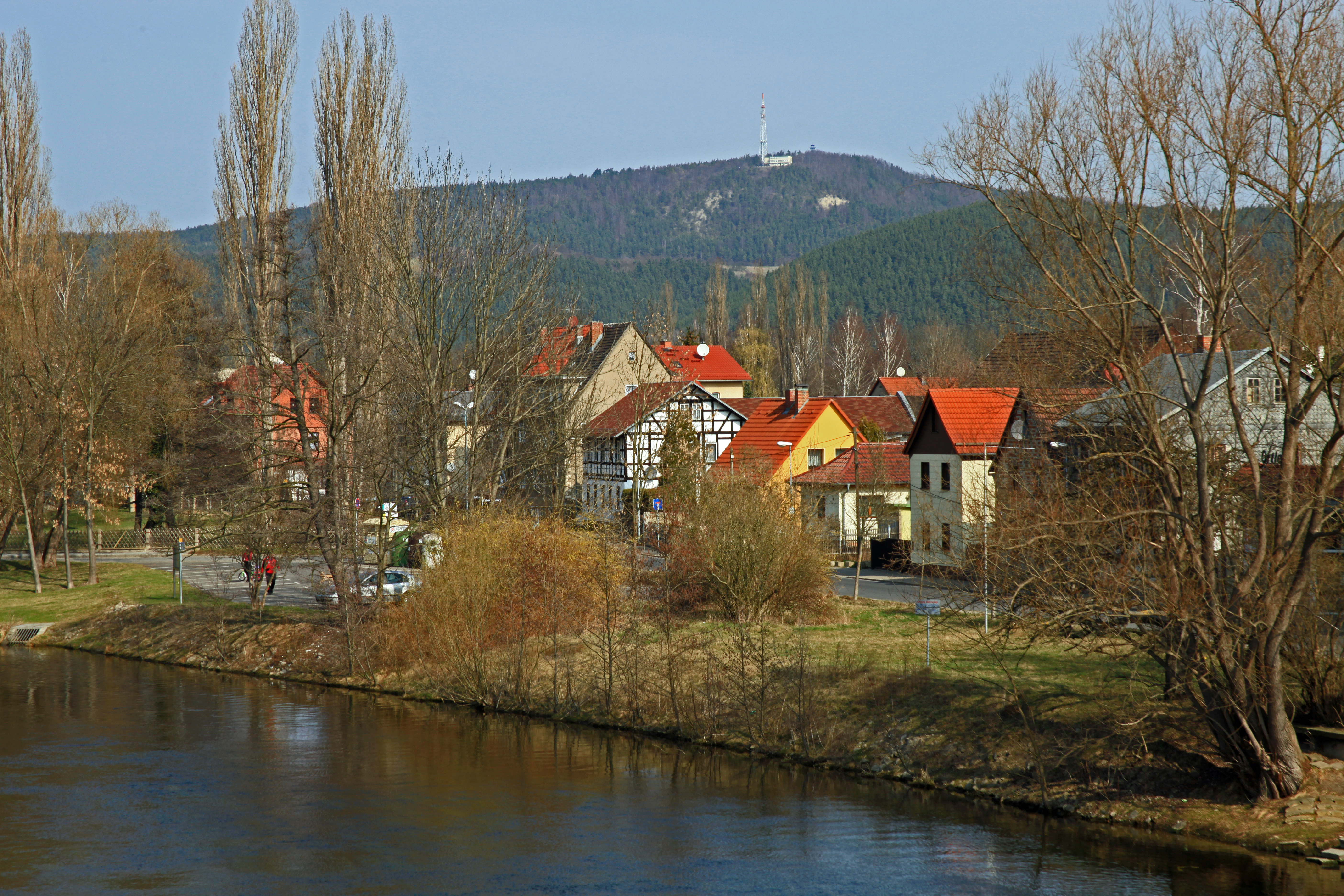 Blick auf Altsaalfeld und Kulmberg von der Saalebrücke